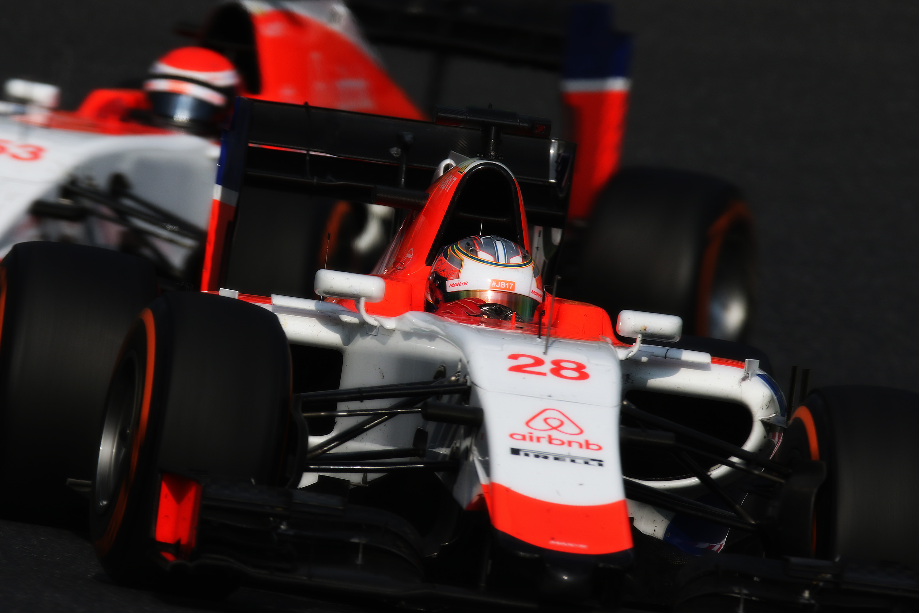 2015.9.27 F1 Rd.14 Suzuka Final Manor Marussia (MR03B) 28 ウィル・スティーブンス [7D2_9963ks]